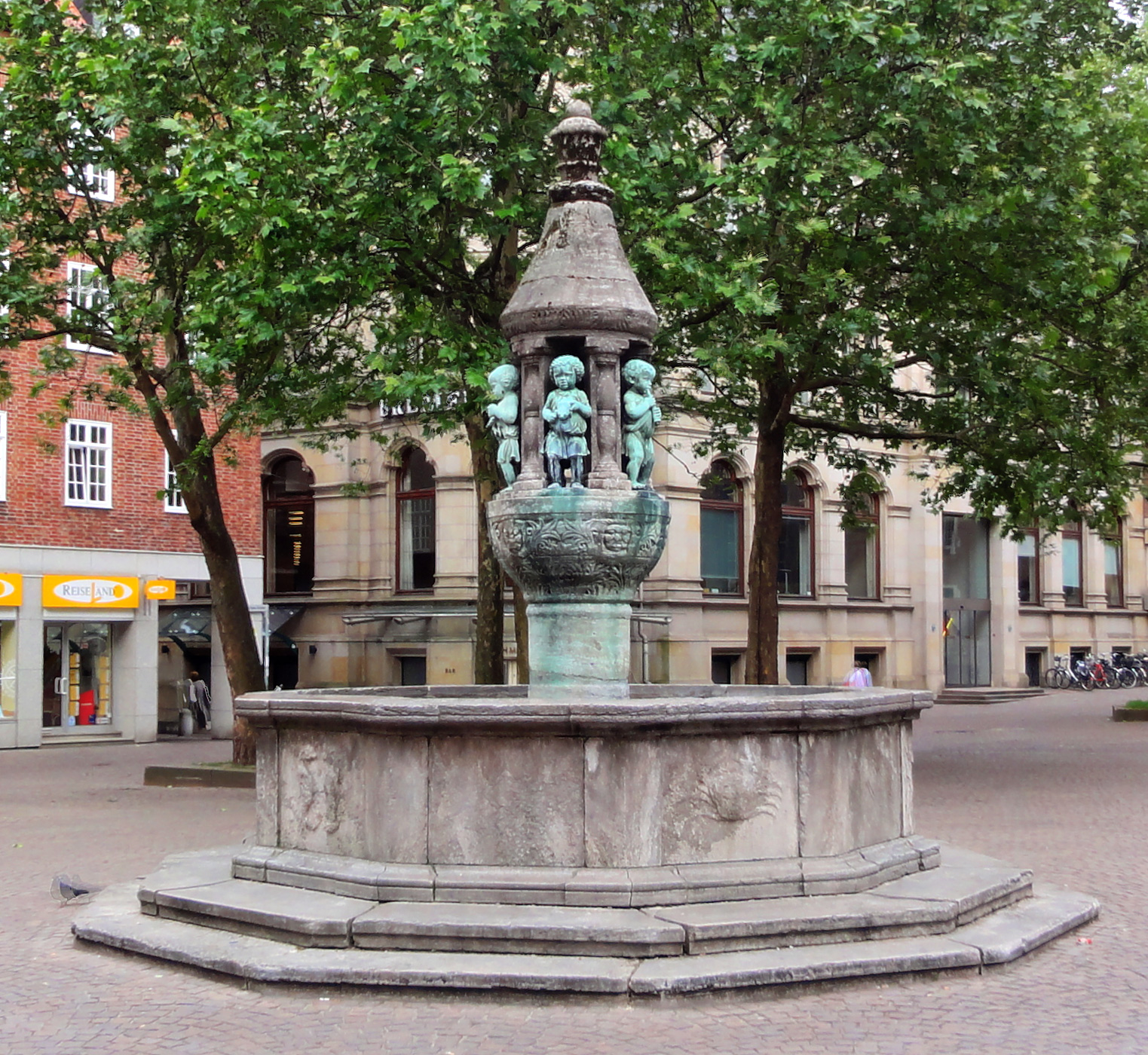 Marcus-Brunnen auf dem Unser Lieben Frauen Kirchhof in Bremen; gestiftet 1908 vom regierenden Bürgermeister Victor Marcus; ausgeführt nach Entwurf des Berliner Architekten Heinrich Jennen mit plastischem Schmuck des Münchner Bildhauers Hermann Hahn; eingeweiht am 14. November 1909Das abgebildete Objekt ist ein geschütztes Kulturdenkmal in der Freien Hansestadt Bremen, mit der Nr. 1177 beim Landesamt für Denkmalpflege registriert.